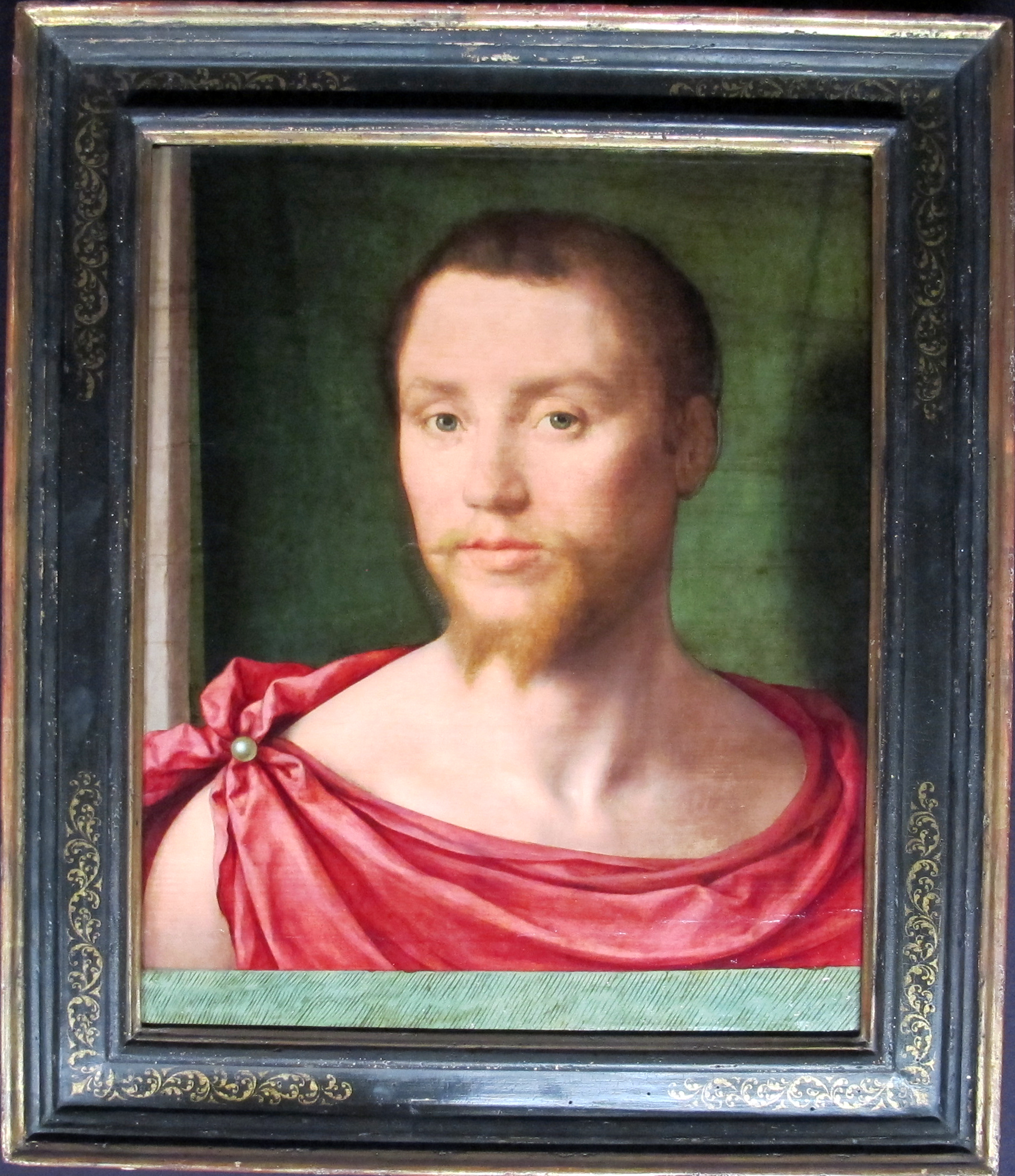 Pittura francese del XVI secolo, Louvre, Parigi